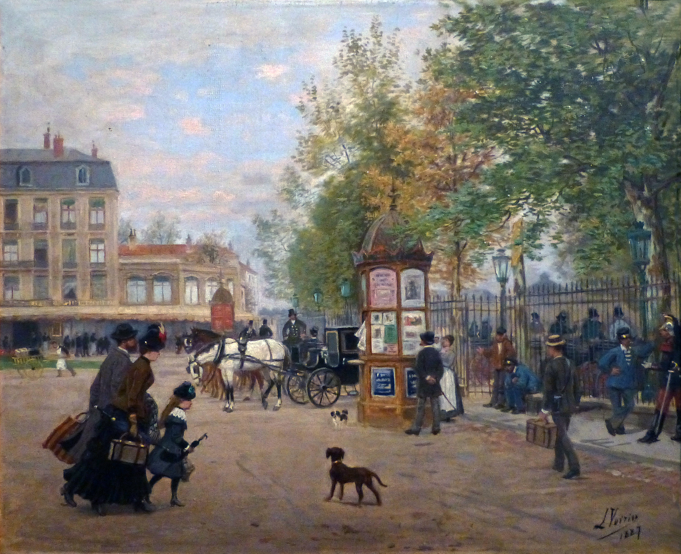 Léon Voirin. La Place Thiers à Nancy en 1887, 2e moitié du 19e siècle. Aquarelle sur papier. Musée Lorrain